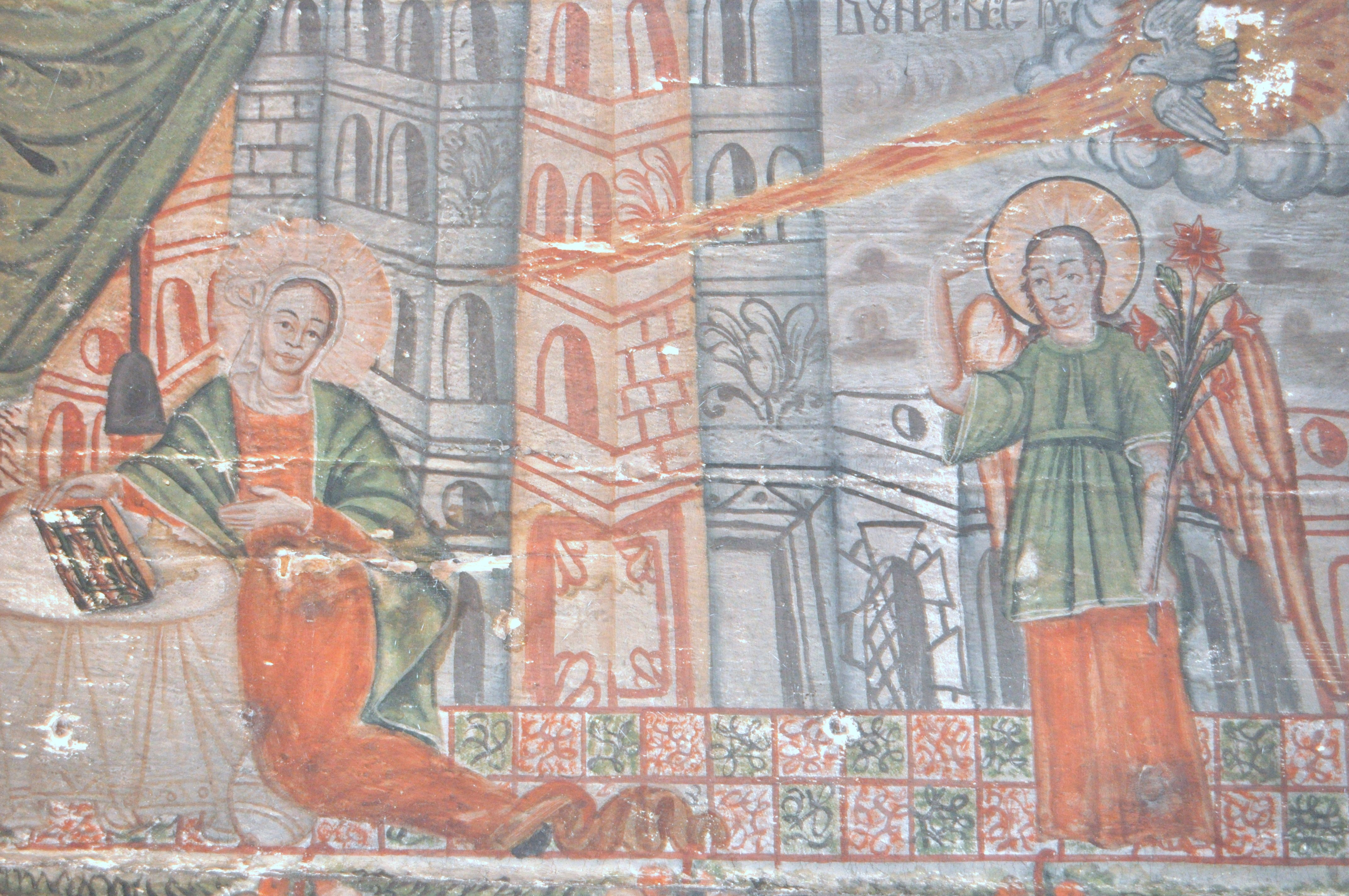 Biserica de lemn din Nadășu, județul Cluj